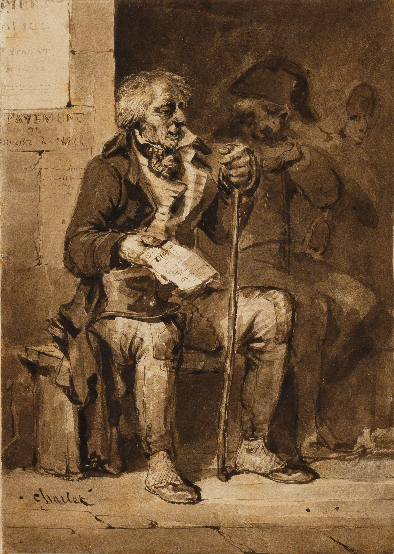 Charlet N.T. - Wash - Le demi-solde - 13x19cm